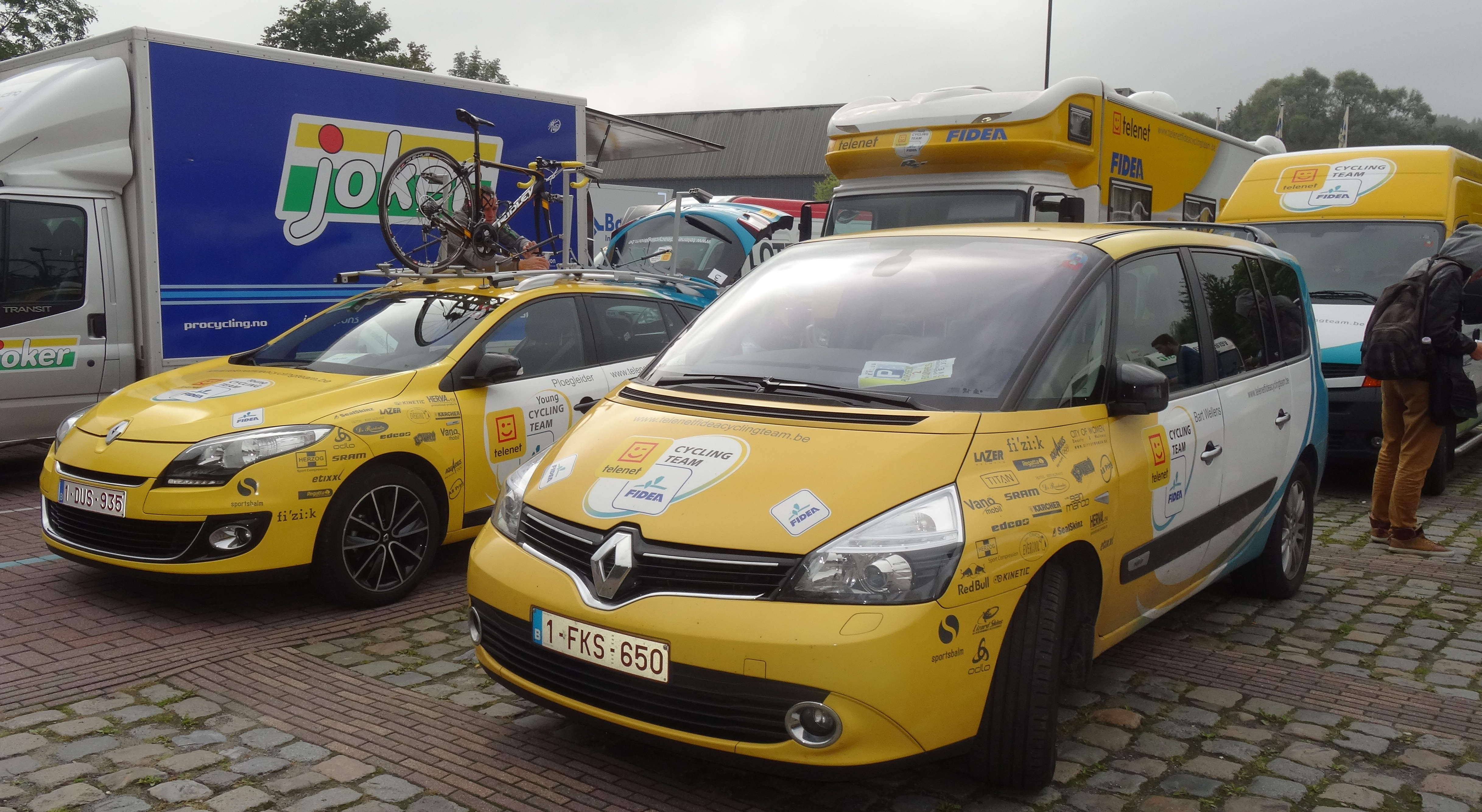 Reportage photographique réalisé le mercredi 27 août à l'occasion du départ de la Druivenkoers Overijse 2014 à Huldenberg, Belgique.